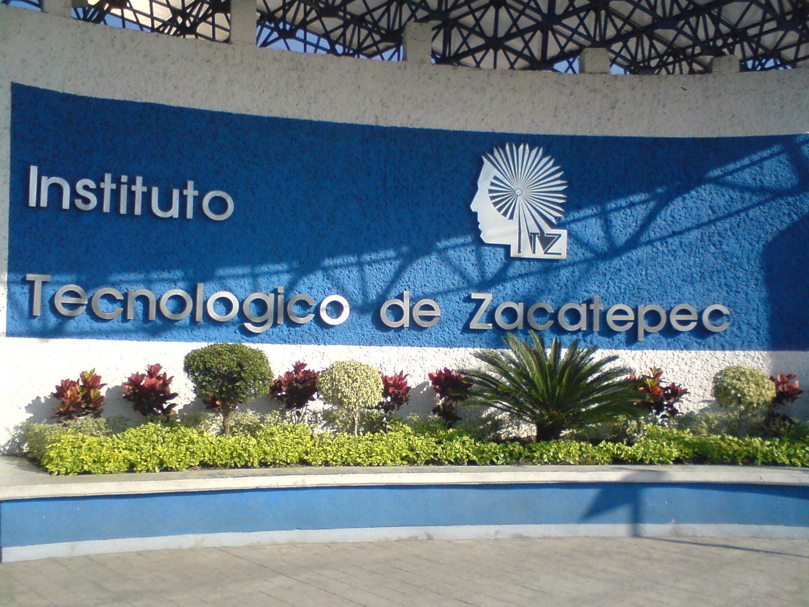 Instituto tecnológico de Zacatepec.